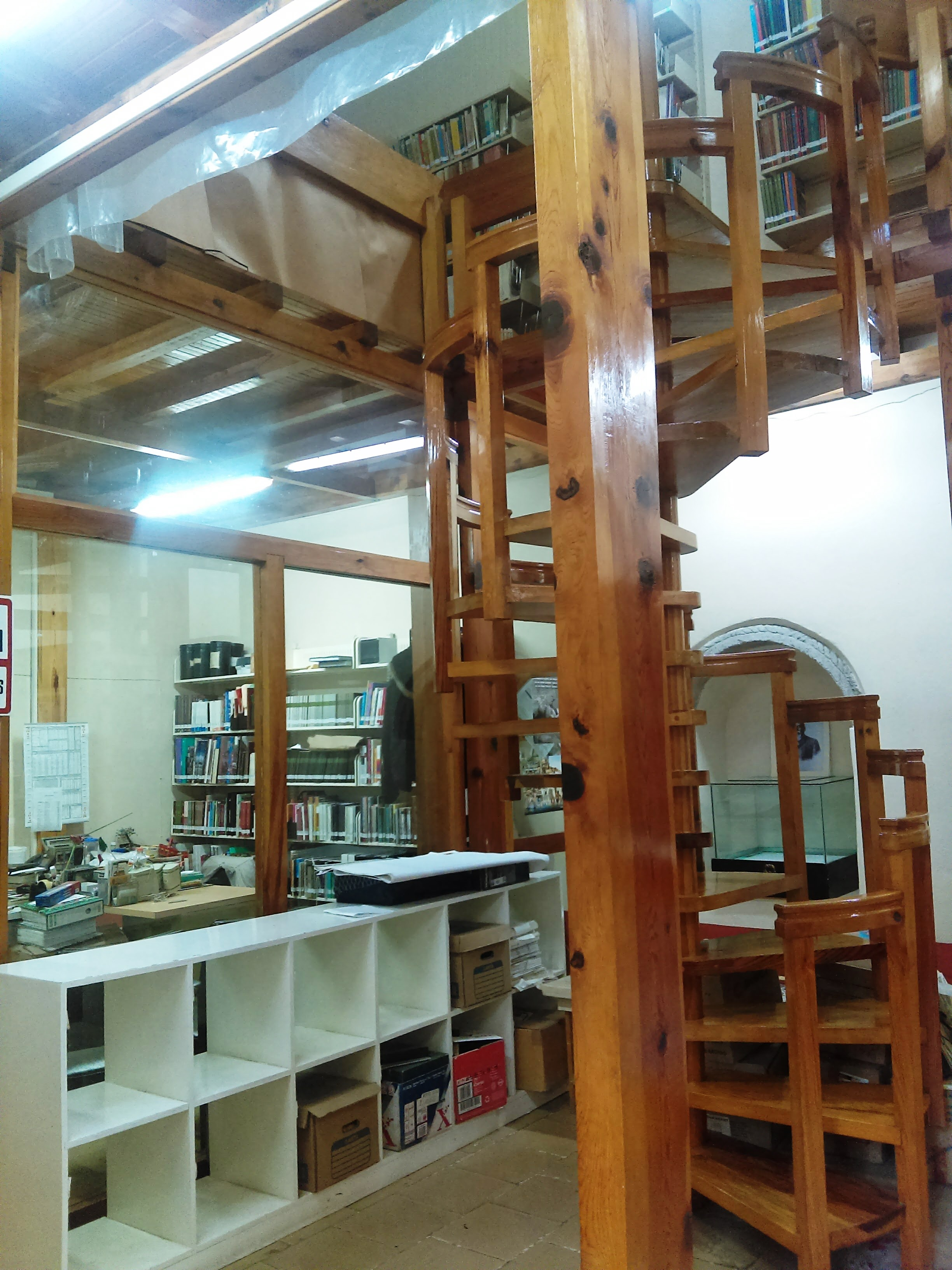 Biblioteca Pública Municipal Antonio Peñafiel del Centro INAH Hidalgo en Pachuca, México.